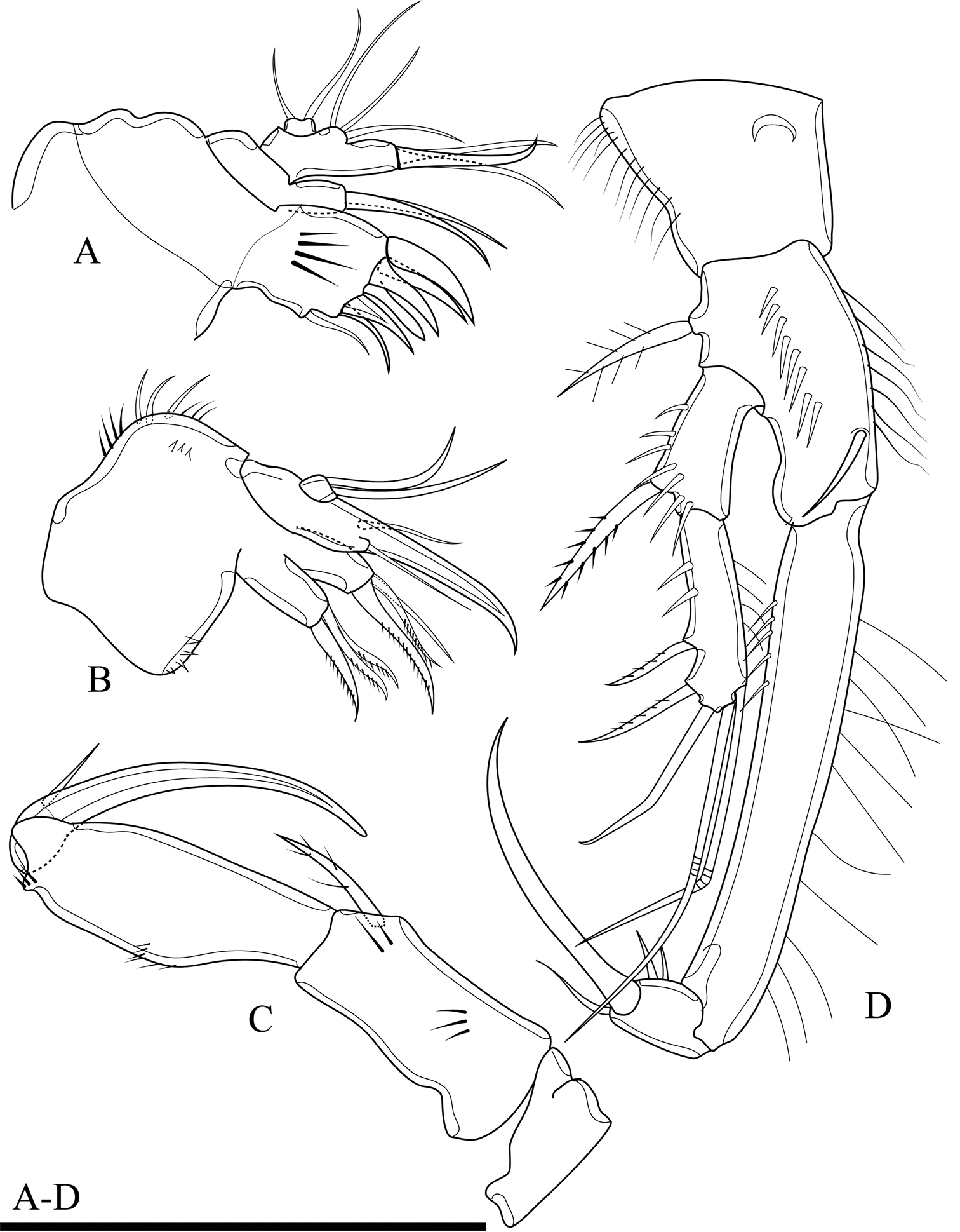 Figure 4; Onychocamptus satunensis sp. n., female holotype. A maxillule B maxilla C maxilliped D P1. Scale bar: 0.05 mm.